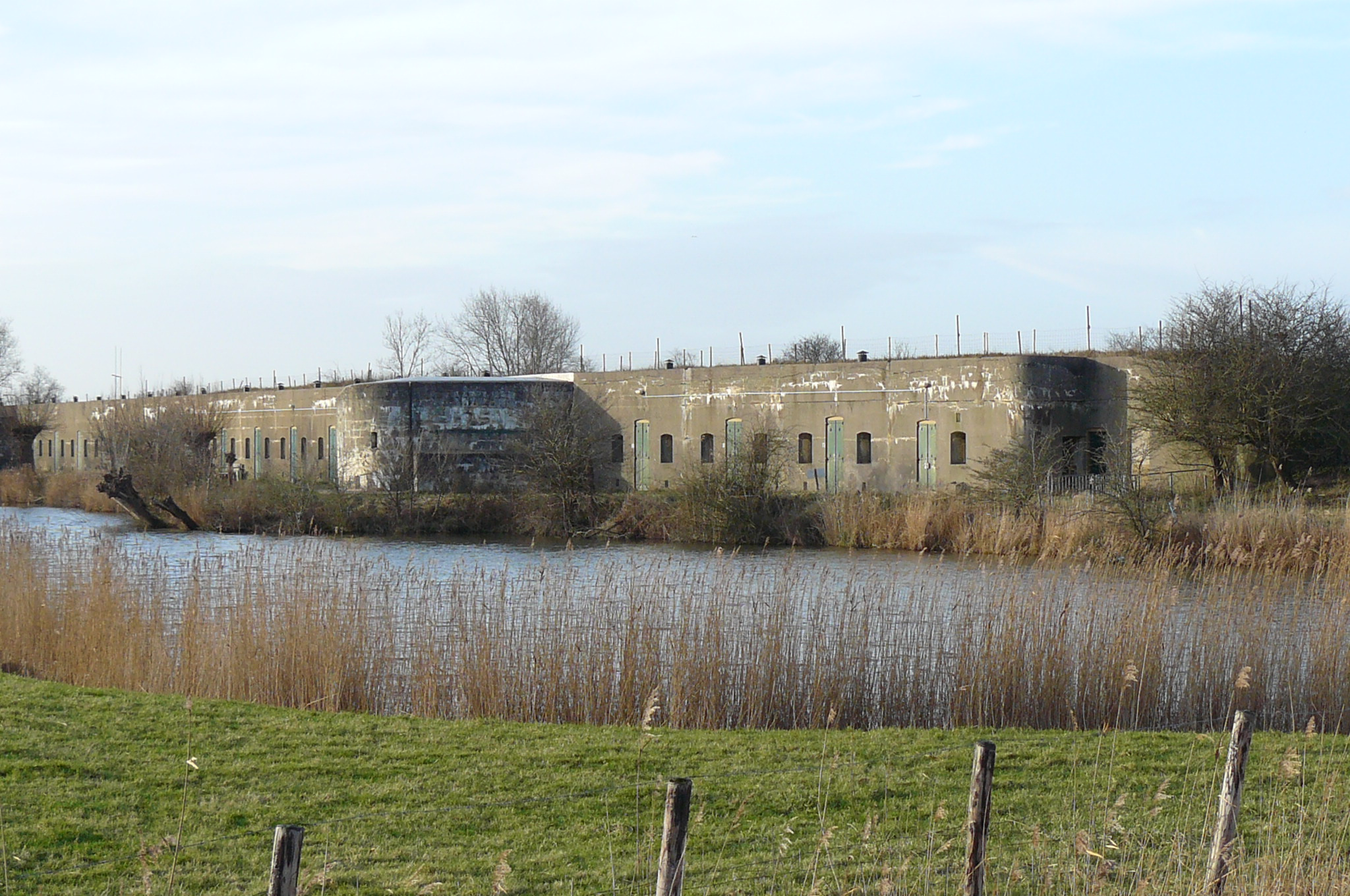 Fort aan de St Aagtendijk gezien vanaf de hoek St. Aagtendijk/Vuurlinie. De foto is in zuidelijke richting genomen.